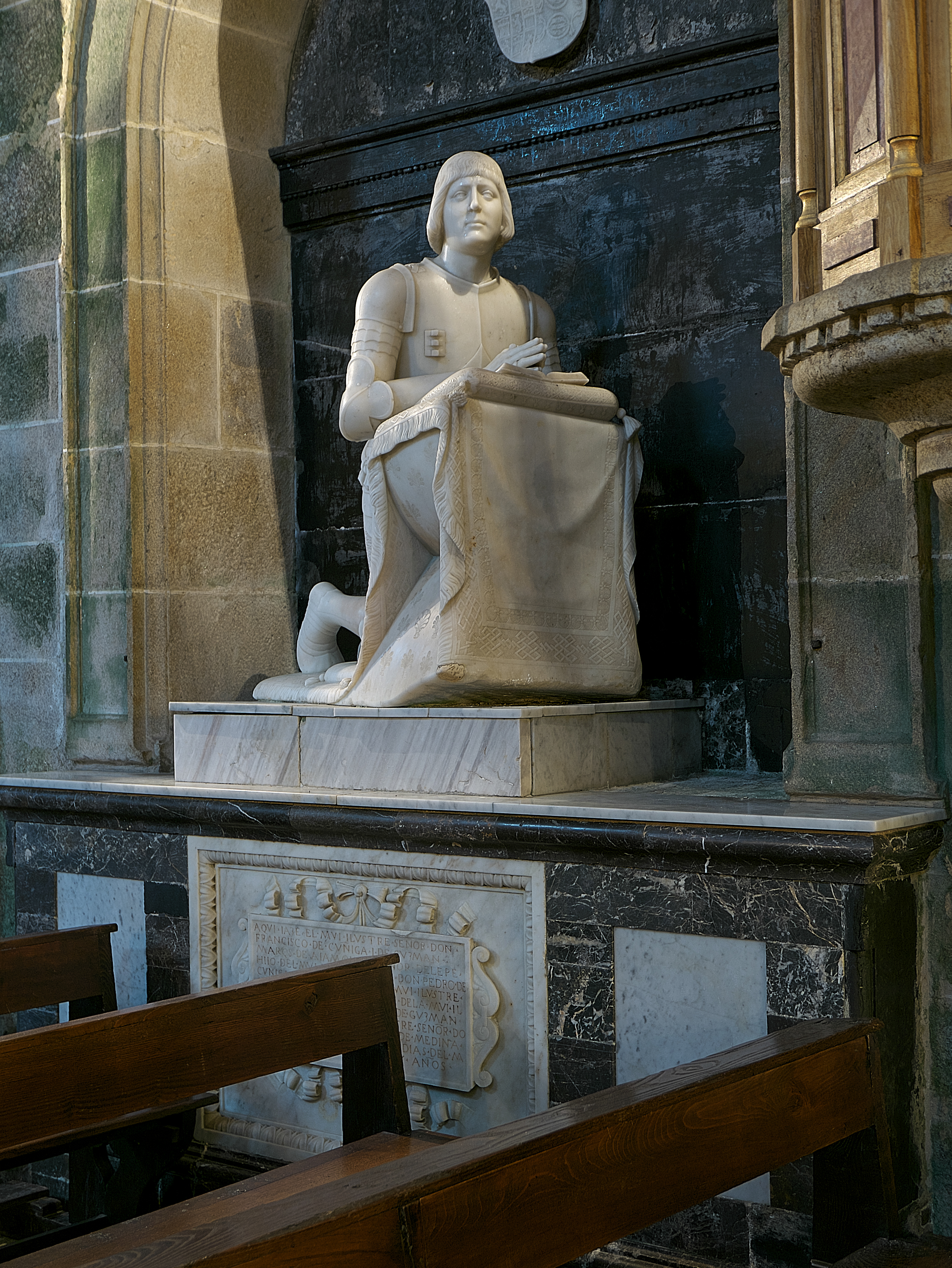 Iglesia del Monasterio de San Lorenzo de Trasouto, Santiago de Compostela. Sepulcro de Francisco de Zúñiga y Pérez de Guzmán (†1525), I Marqués de Ayamonte y Señor de Lepe. Tallado en mármol de Carrara por Antonio María Aprile de Carona, procedente de la iglesia de la Casa Grande de San Francisco, Sevilla.